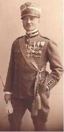 Ritratto del colonnello Cosma Manera